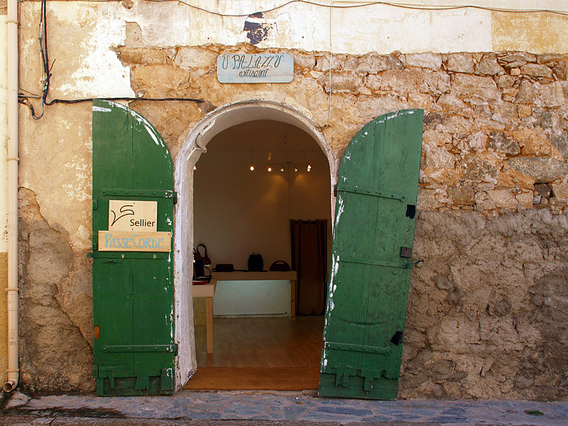 Calenzana - Boutique d'un artisant local